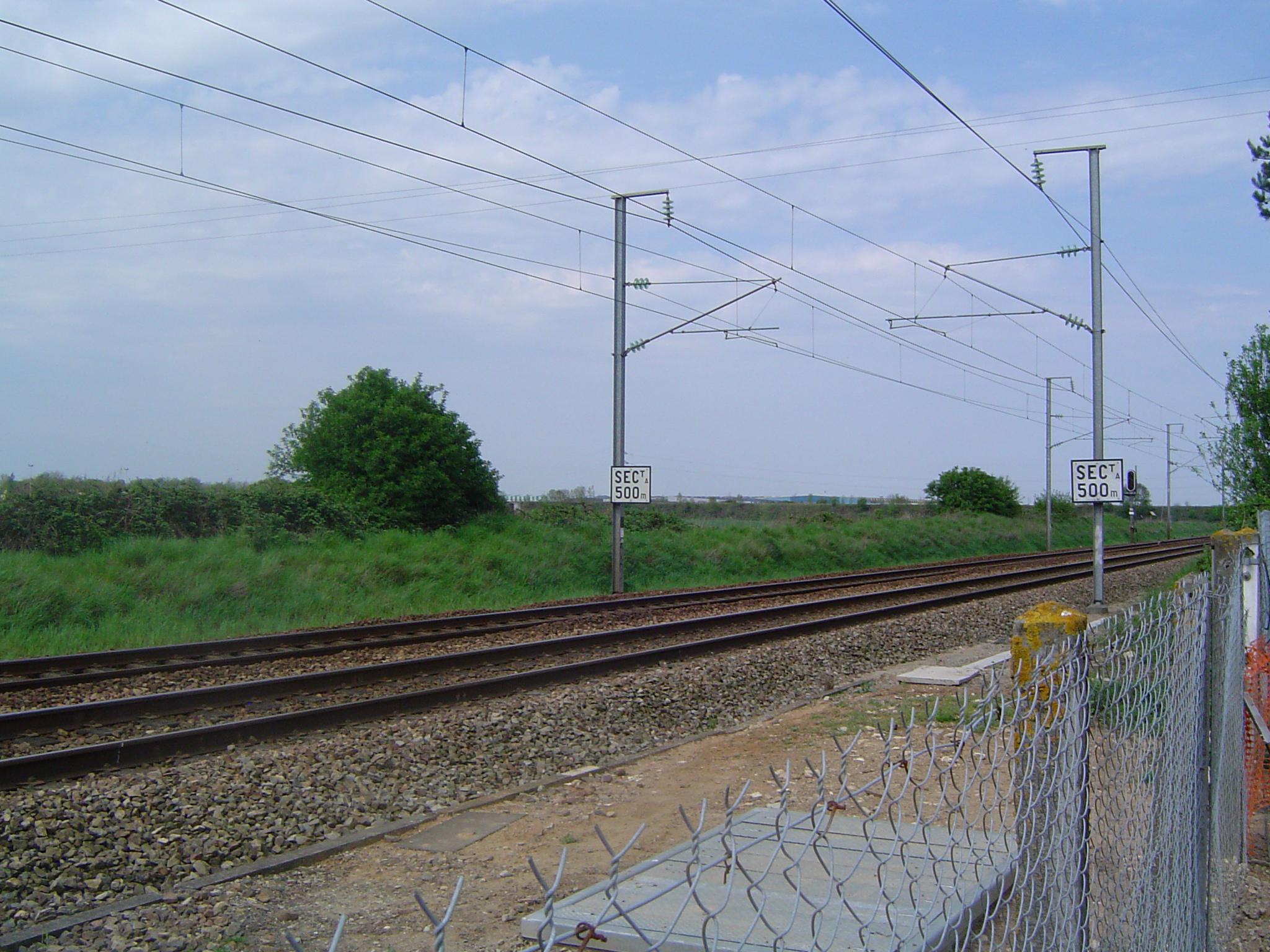 Photo de la caténaire 25 kV/50 Hz sur la ligne Paris-Cherbourg Auteur : Bras Cyril Site